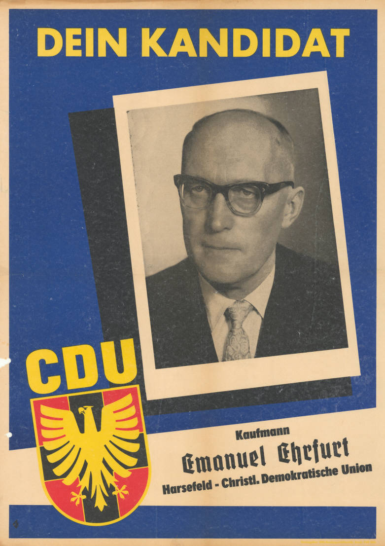 Dein Kandidat CDU Kaufmann Emanuel Ehrfurt Harsefeld - Christl. Demokratische Union Abbildung: Porträtfoto - CDU-Wappen Plakatart: Kandidaten-/Personenplakat mit Porträt Auftraggeber: CDU-Bundesgeschäftsstelle, Bonn Drucker_Druckart_Druckort: KVD, Köln Objekt-Signatur: 10-008 : 163 Bestand: Landtagswahlplakate Niedersachsen (10-008) GliederungBestand10-18: Landtagswahlplakate Niedersachsen (10-008) » CDU Lizenz: KAS/ACDP 10-008 : 163 CC-BY-SA 3.0 DE